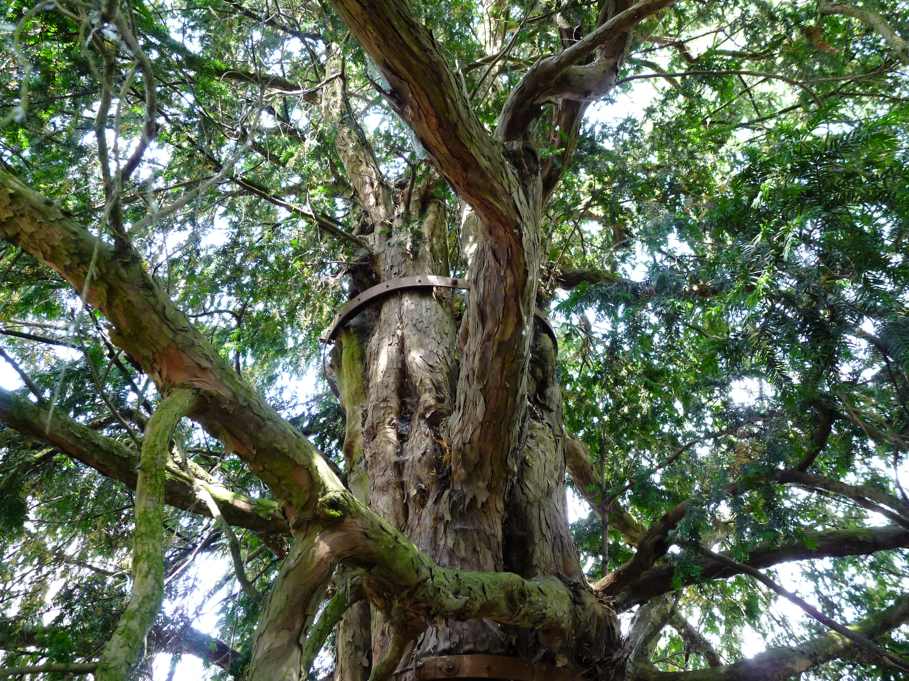 Naturdenkmal, 1000jährige Eibe Neuländer Elbdeich Hamburger Neuland, ältester Baum Hamburg